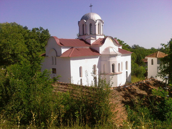 Црквата Св. Никола во Пожаране